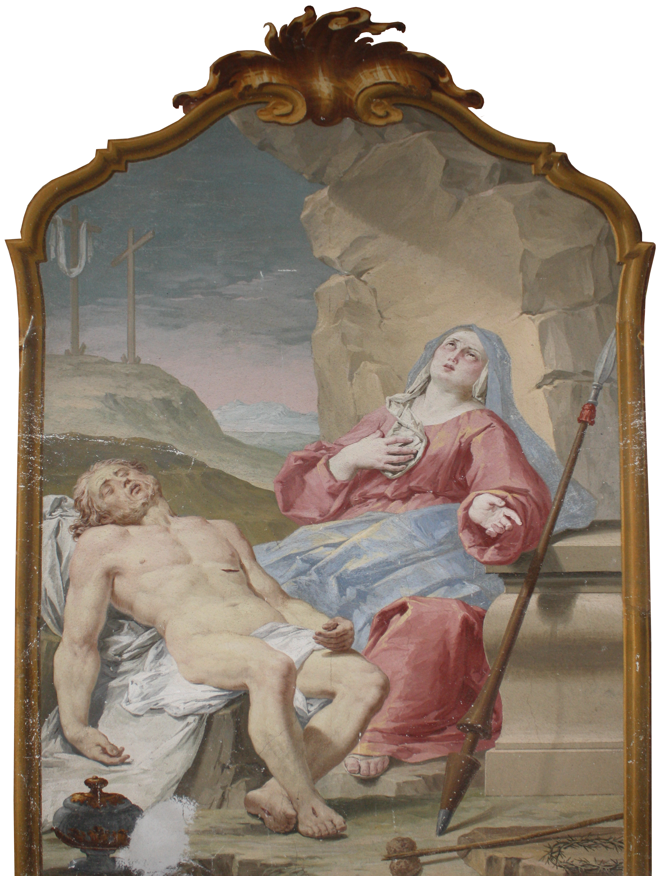 Affresco raffigurante la Deposizione, opera di Biagio Bellotti del 1767 sulla parete della cappella a sinistra del presbiterio della chiesa di Sant'Alessandro a Montonate (VA)